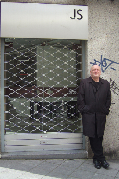 Jürgen Schneider, Schriftsteller und Übersetzer (Oktober 2008).